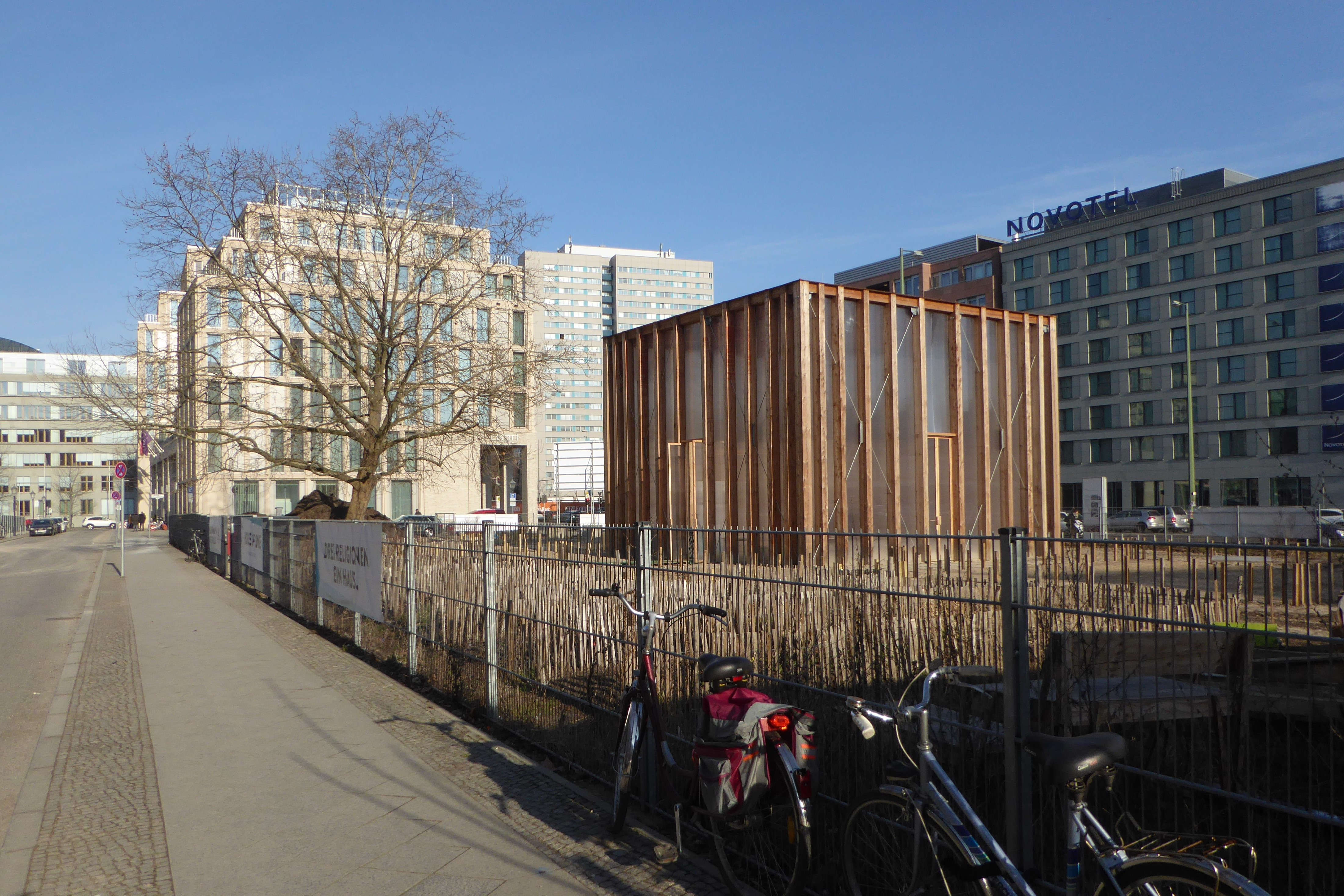 "House of One" - Pavillon (1:1 Modell der „Stadtloggia“ im geplanten 40 Meter hohen Turm (Architekten Kuehn Malvezzi, Berlin)), Konstruktion aus Holz, die dem zentralen Raum des zukünftigen "House of One" nachempfunden ist